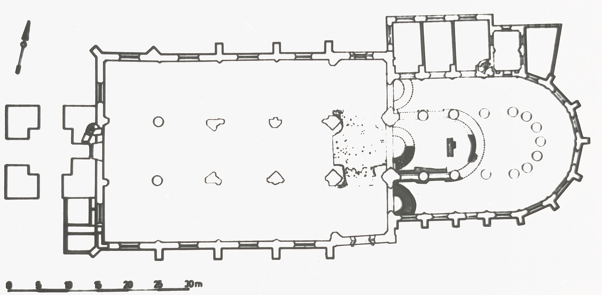 Martinikerk: INTERIEUR, PLATTEGROND